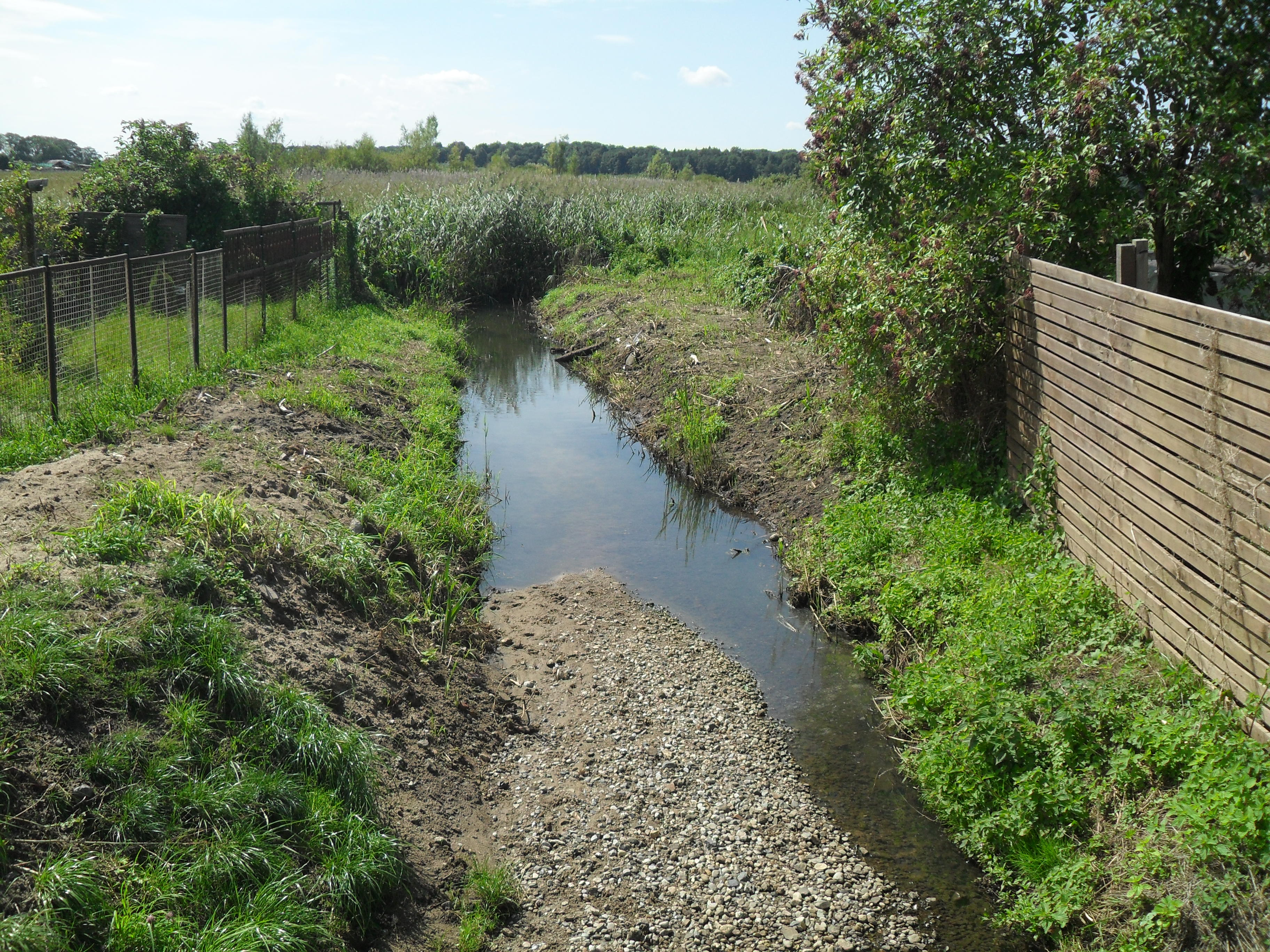 Stendlitz nach Unterqueren der Bahnstrecke Neustrelitz–Berlin